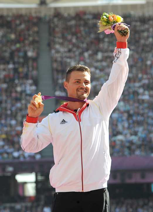 Paralympics 2012: Heinrich Popow feiert Gold